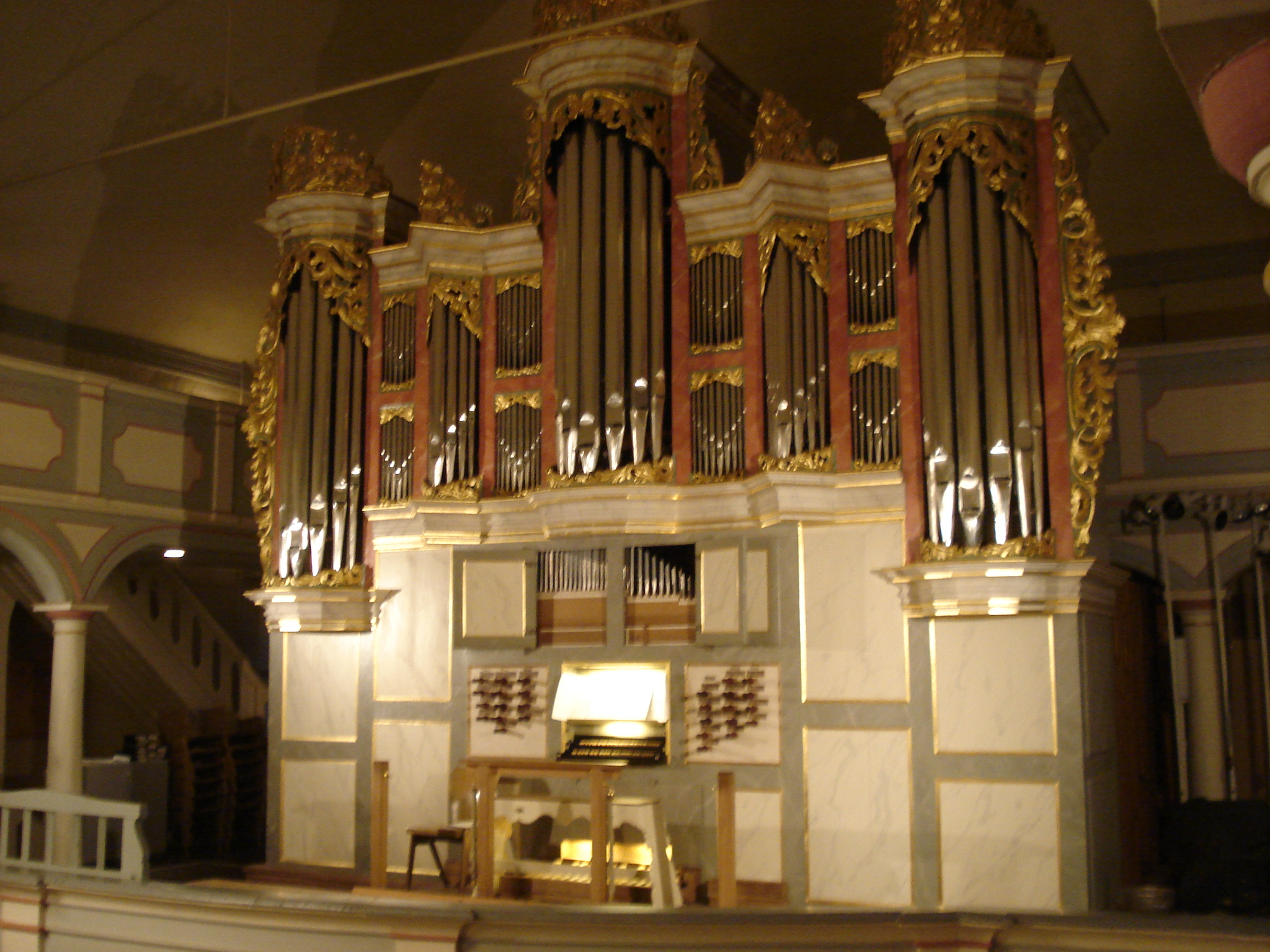 Christian-Vater-Orgel in St.Nicolai/Gifhorn